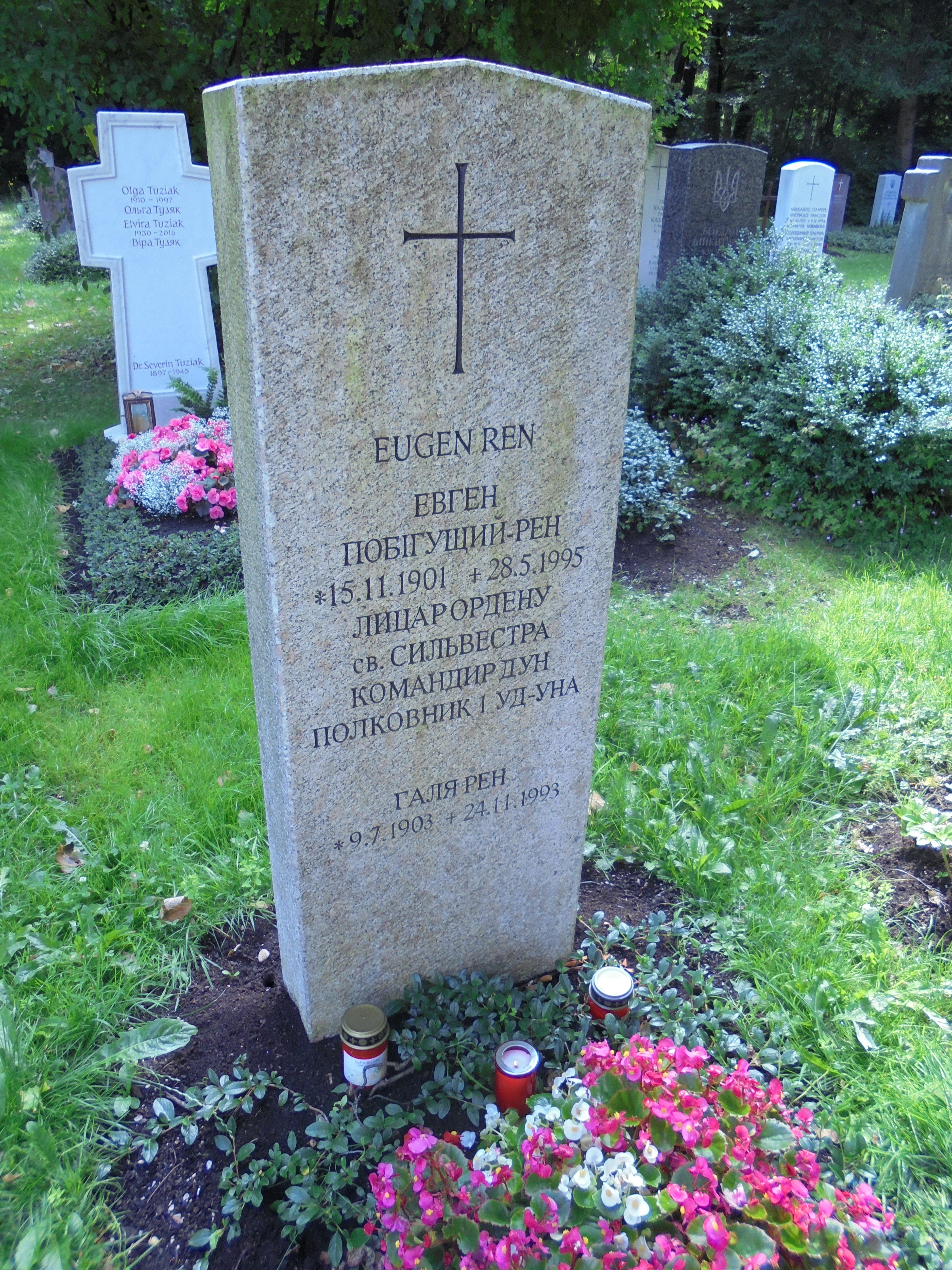 Могила полк. Є. Побігущого-Рена, 2017 р.